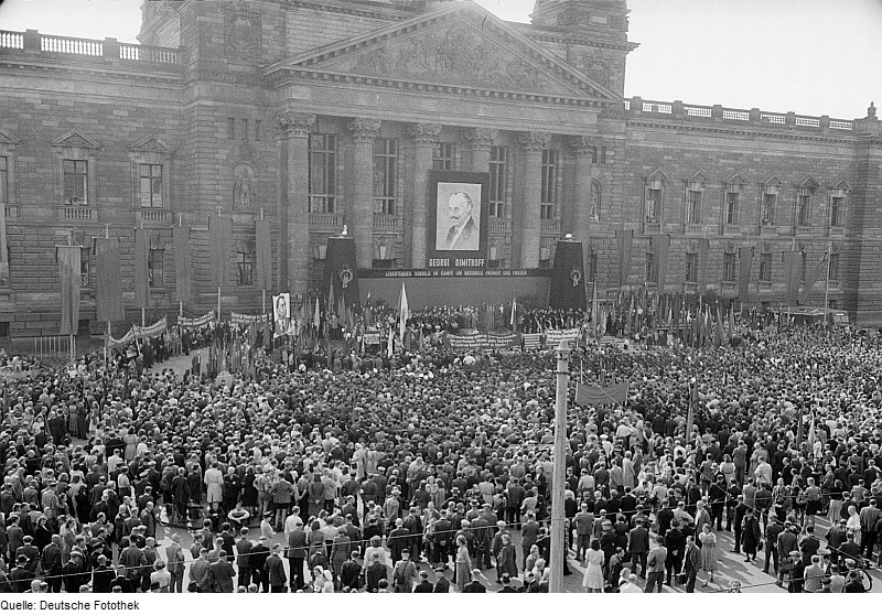 Original image description from the Deutsche Fotothek Tribüne und Teilnehmer der Dimitroff-Ehrung